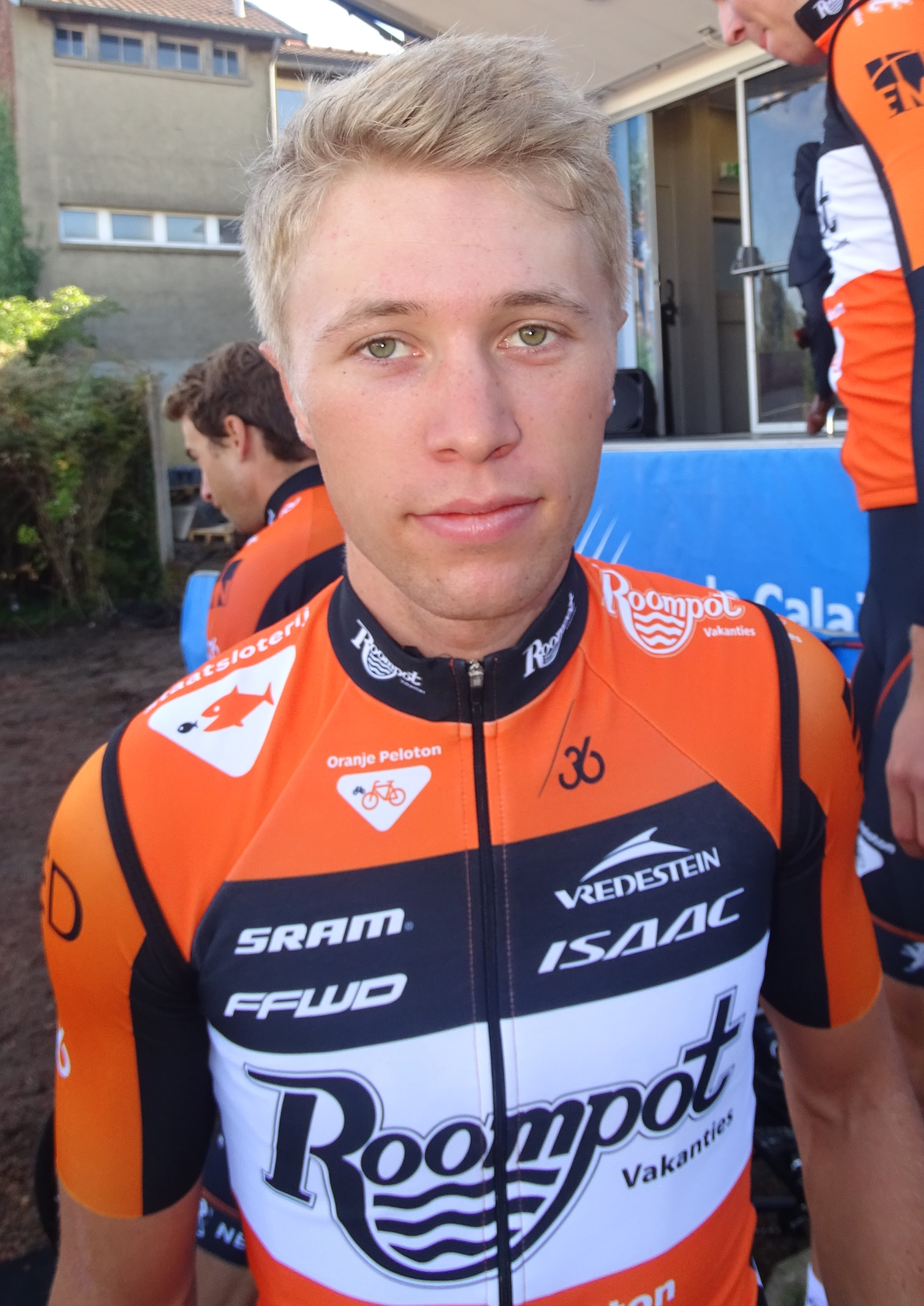 Reportage réalisé le dimanche 20 septembre à l'occasion du départ et de l'arrivée du Grand Prix d'Isbergues 2015 à Isbergues, Nord-Pas-de-Calais, France.